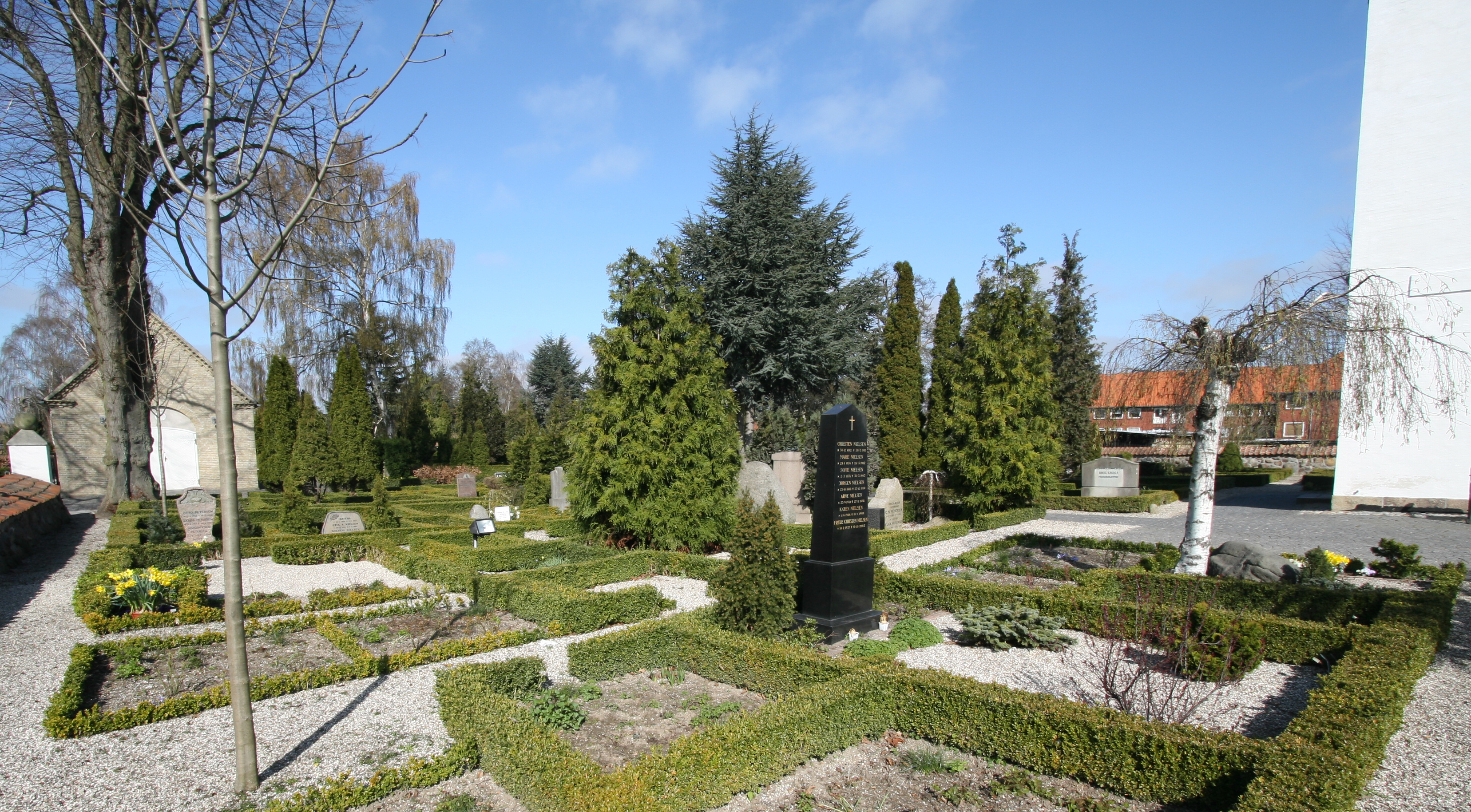 Hvidovre Kirke, Denmark Churchyard.